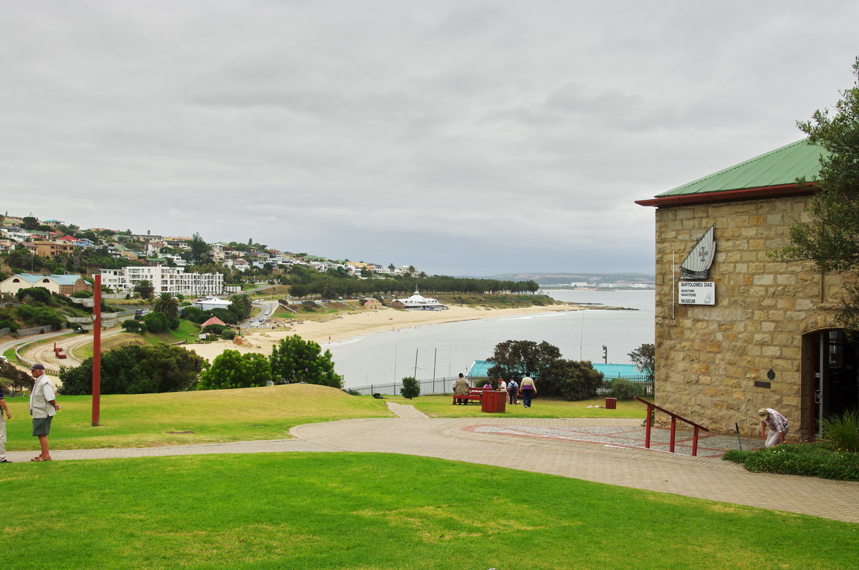 Diazmuseum Mossel Bay